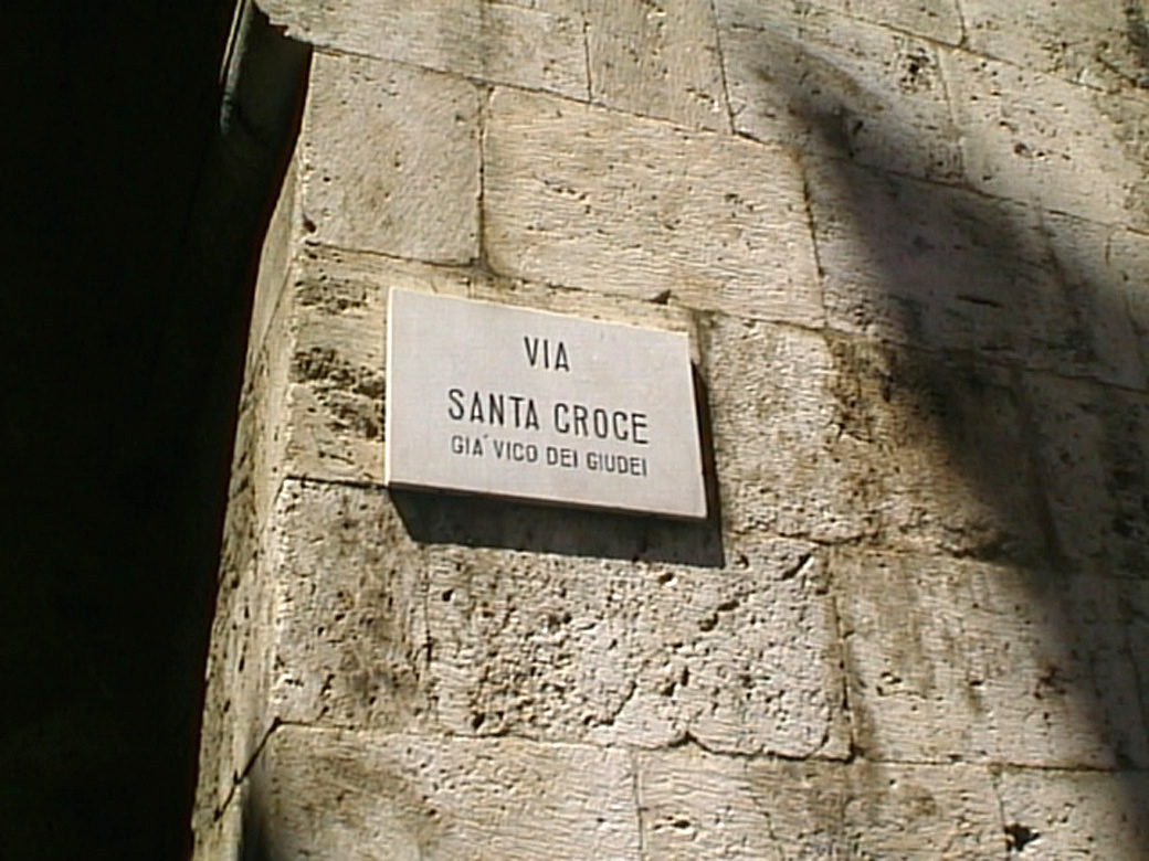 Targa stradale della via Santa Croce sul muro della Torre dell'Elefante